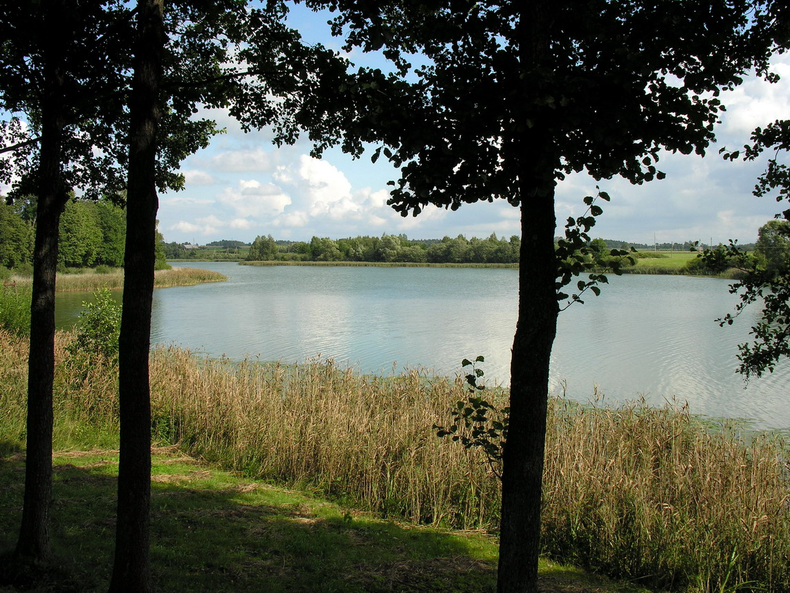 Sedulos ežeras, Mažeikių raj., Sedos seniūnija Foto: Algirdas, 2006 m. rugsėjo 2 d., Lietuva